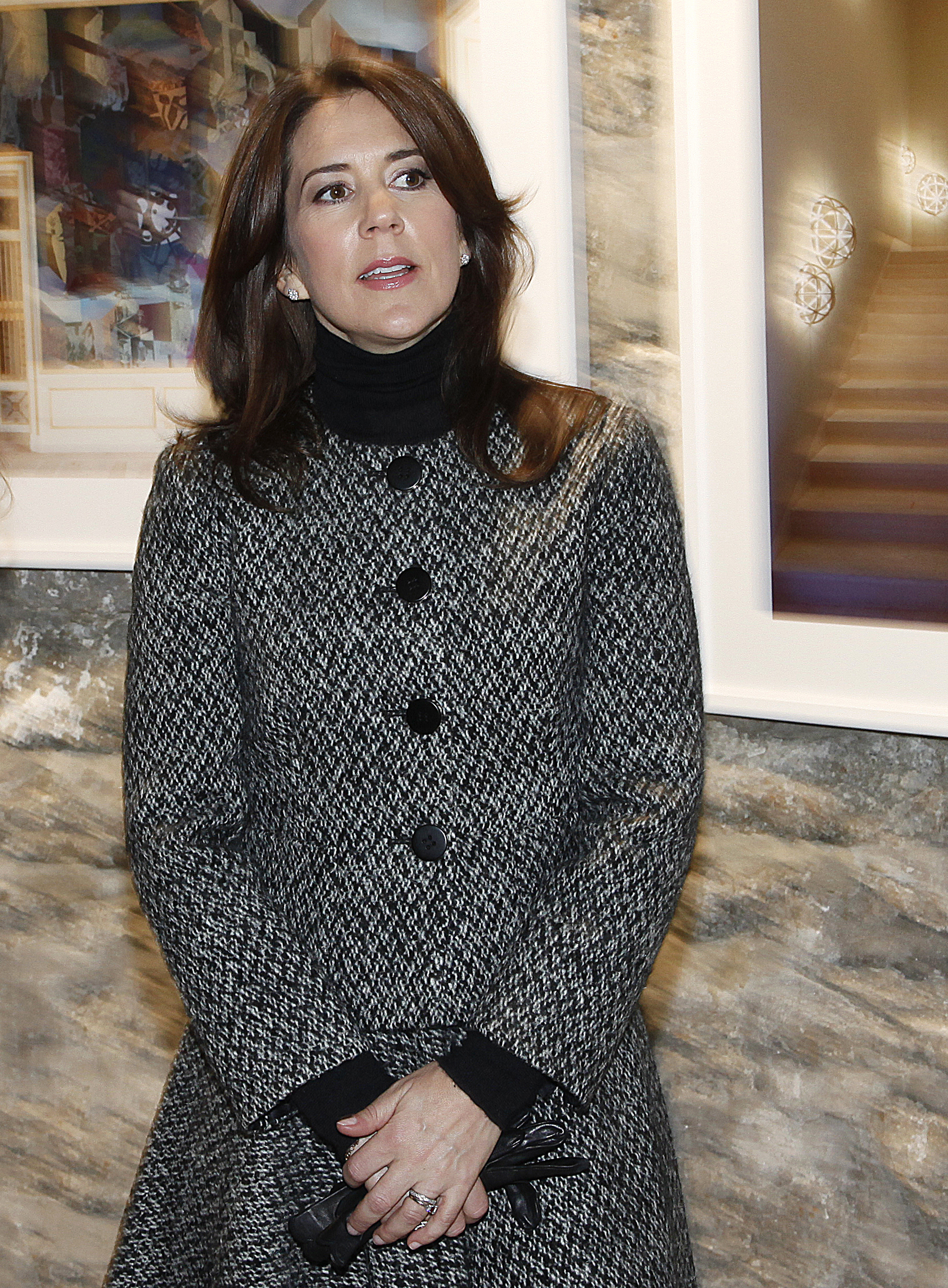 Kroonprintsess Mary Kiek in de Kökis 01.04.14